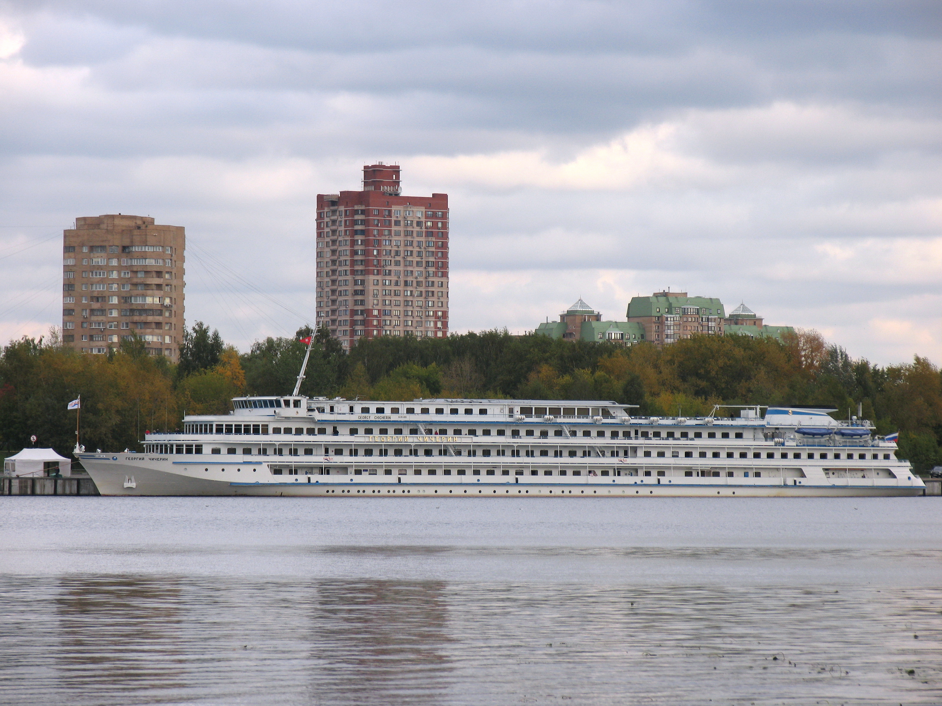 Речное круизное судно "Георгий Чичерин" в Северном речном порту, Москва.